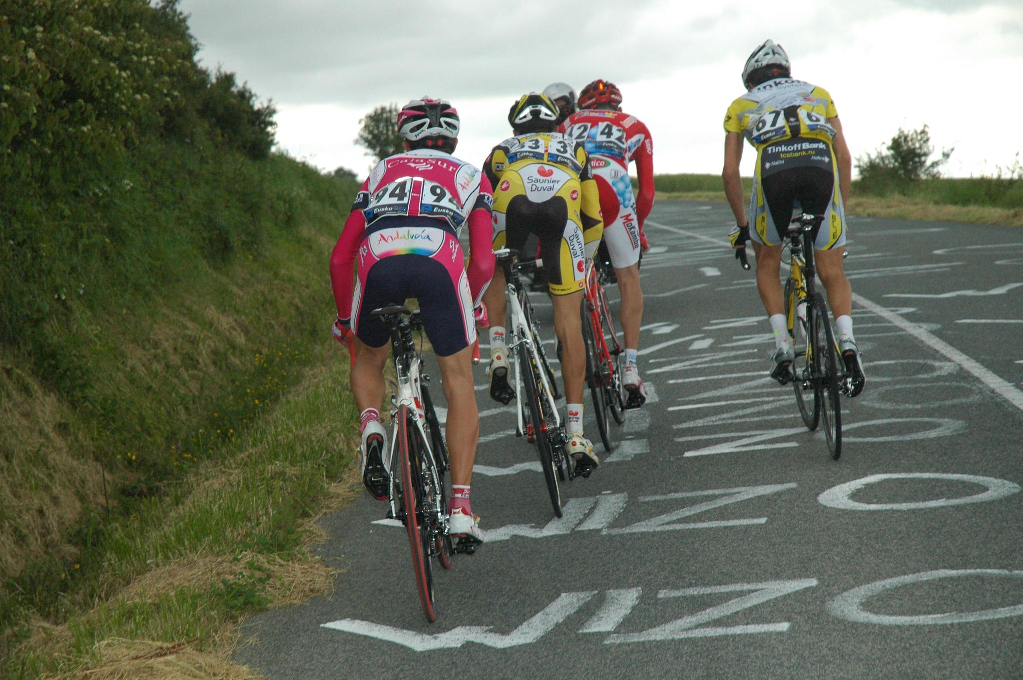 Euskal Bizikleta 2008, Stage 3, climbing.